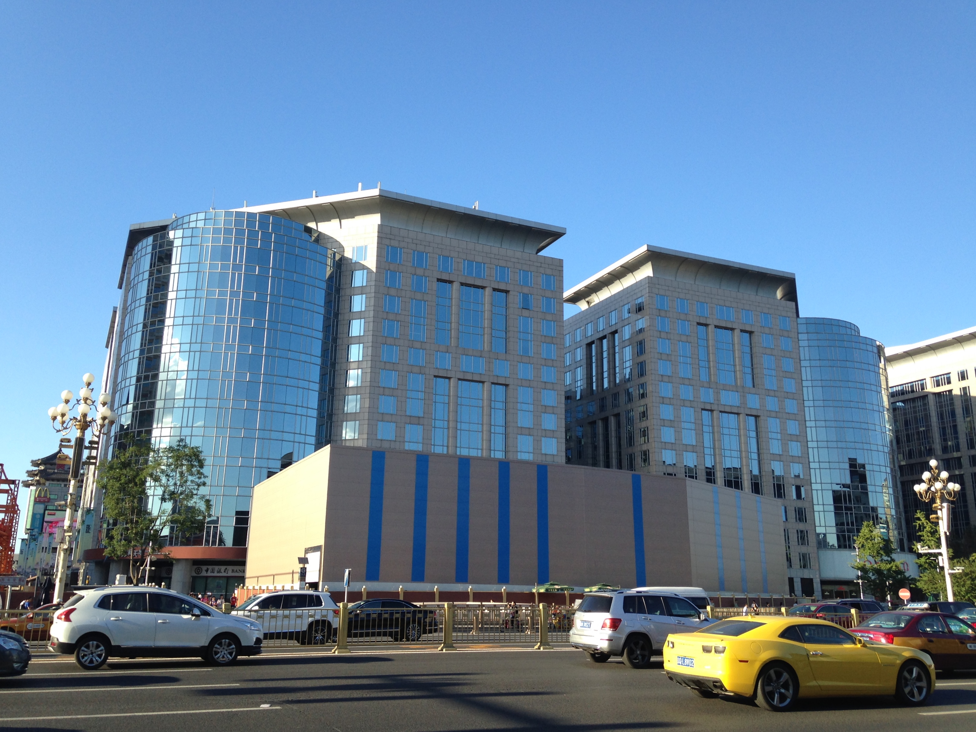 王府井・東方広場